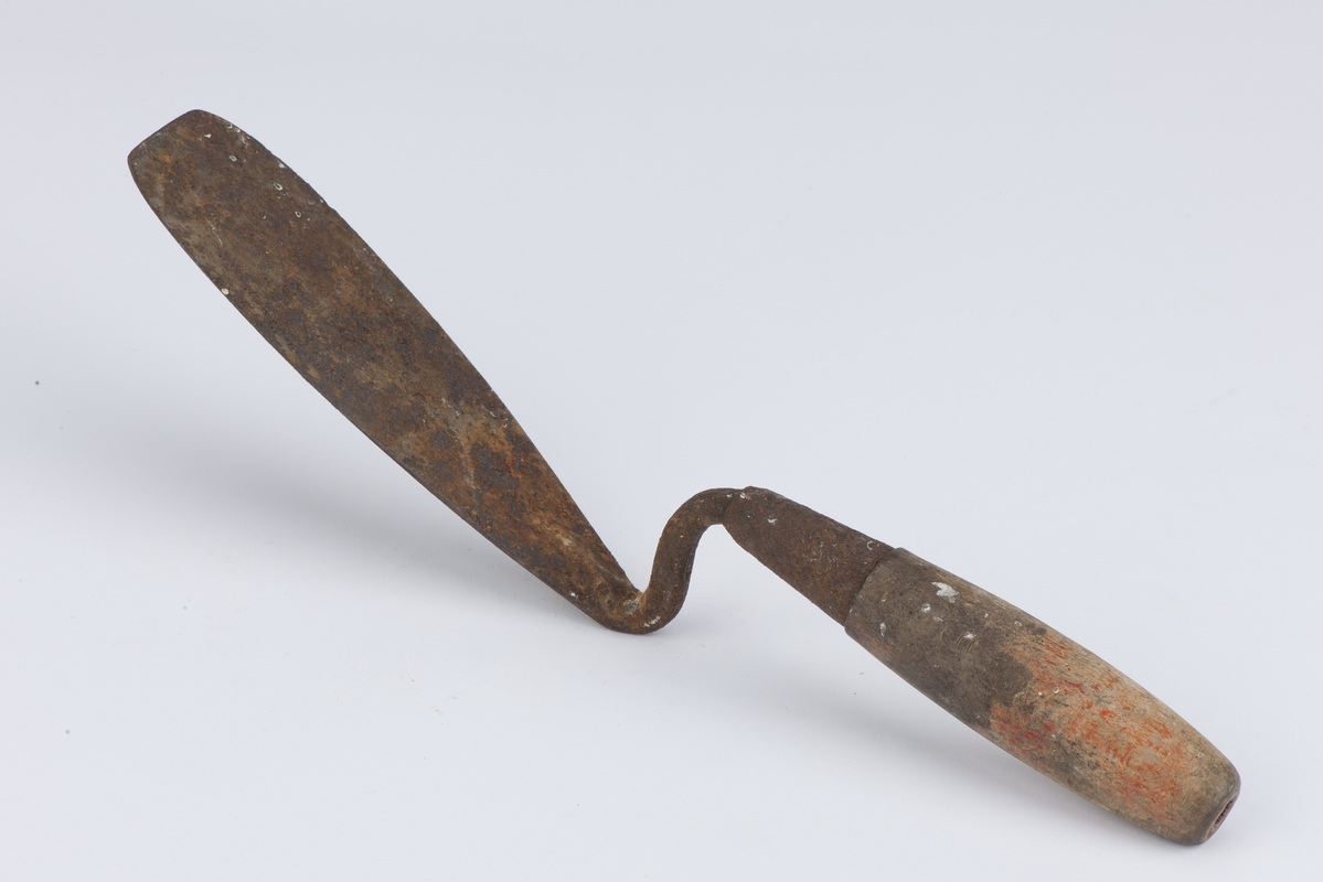 Murskje eller flyndreskje. Oval form med butt skjekant. Fabrikkprodusert med trehåndtak Inventarnr. HL.06150